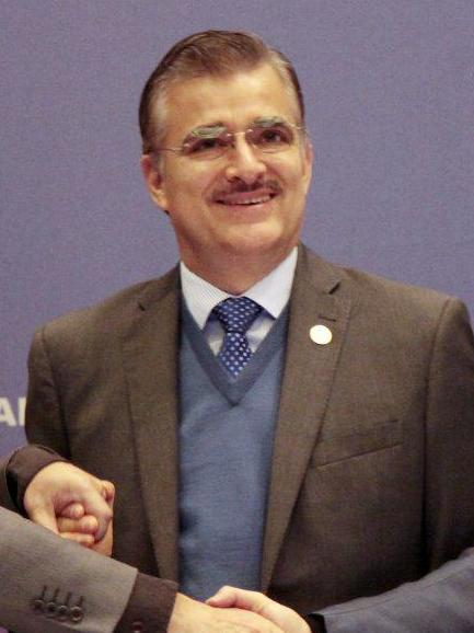 “Nunca un poema había definido tan bien la dinámica de un espacio como lo ha hecho el verso de León Felipe Ganarás la luz”. La frase es de Tonatiuh Bravo, rector de la Universidad de Guadalajara para resumir lo que ha supuesto la presencia de la capital española en la 31 edición de la cita con el libro más importante en el mundo de habla hispana. “Madrid –continuó- dio luz a esta fiesta de los lectores”.